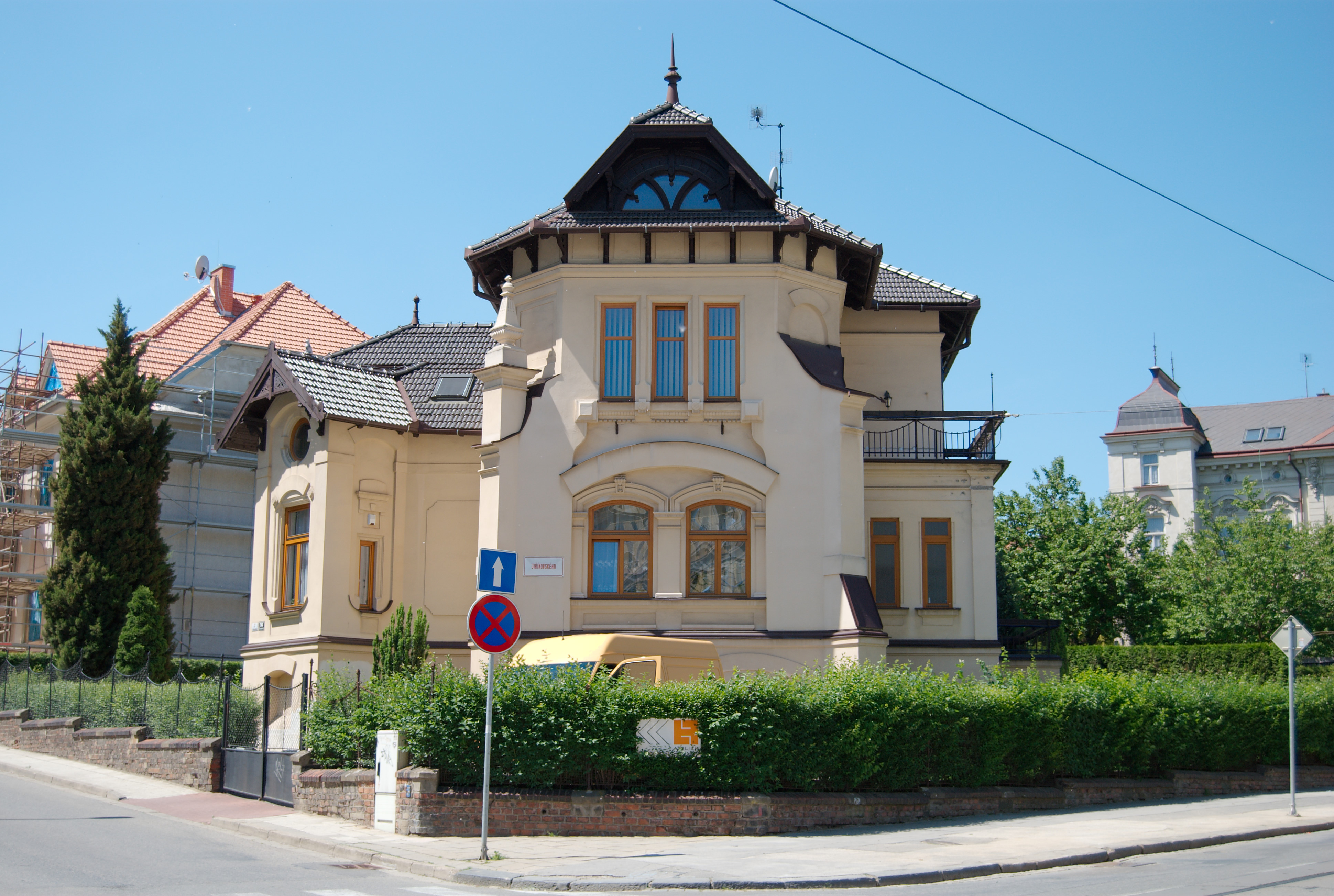 Brno-Masarykova čtvrť - původní německý dům na rohu Údolní a Jiříkovského